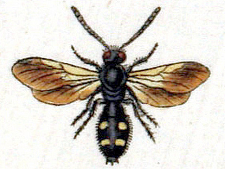 Scolia quadripunctata